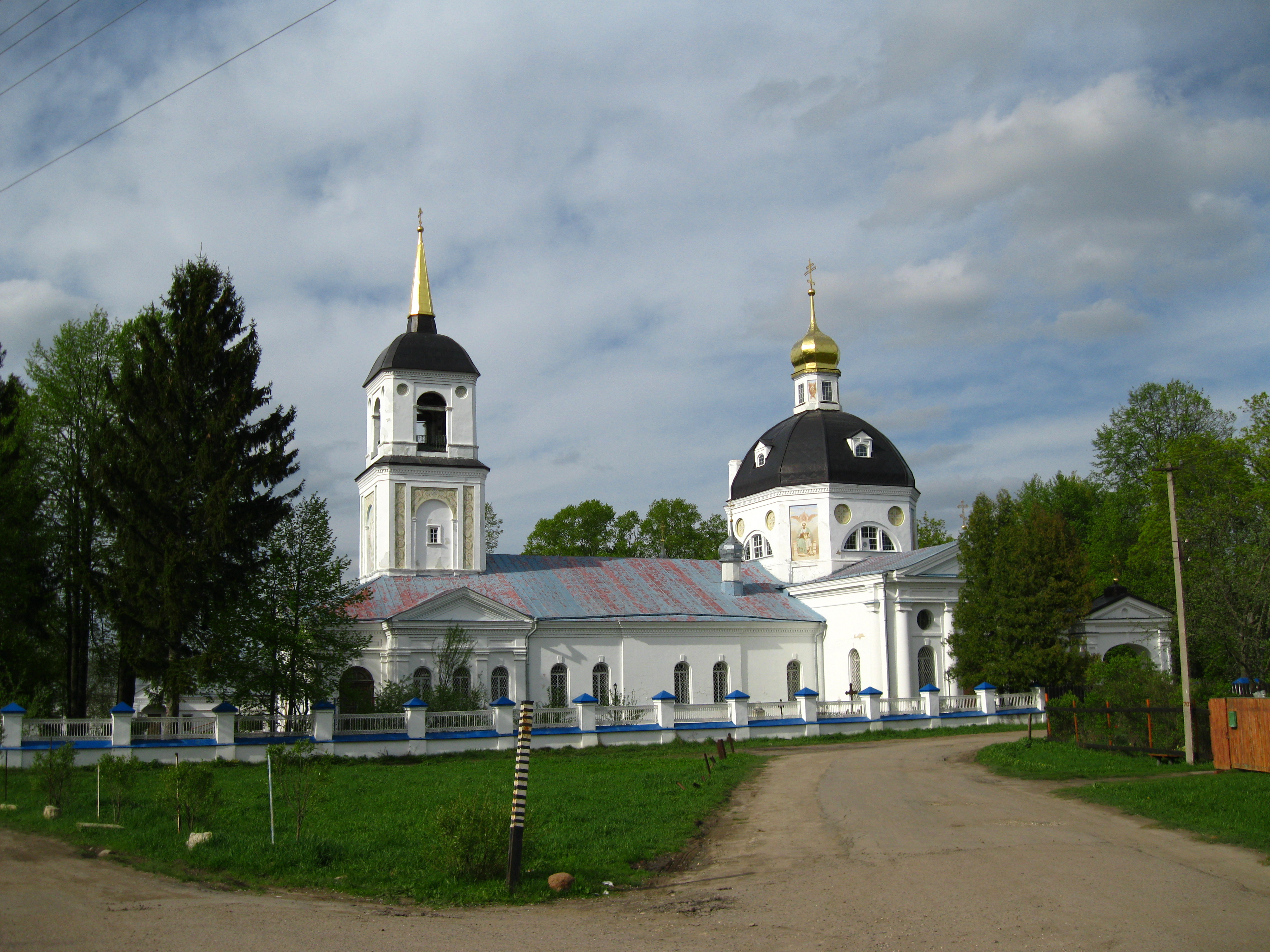 Ансамбль Воскресенской церкви (Москва и Московская область, Высоковск, деревня Шипулино)